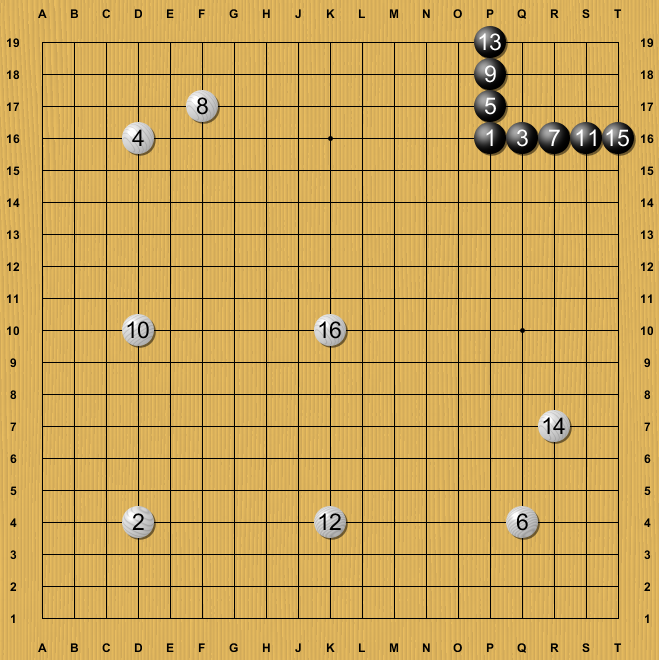 Apertura en el go